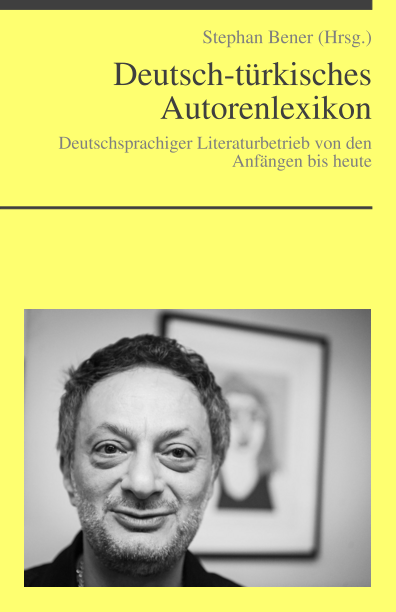 Beispiel für eine Titelseite des Wikipedia-Buchs Deutsch-türkisches Autorenlexikon Band 1